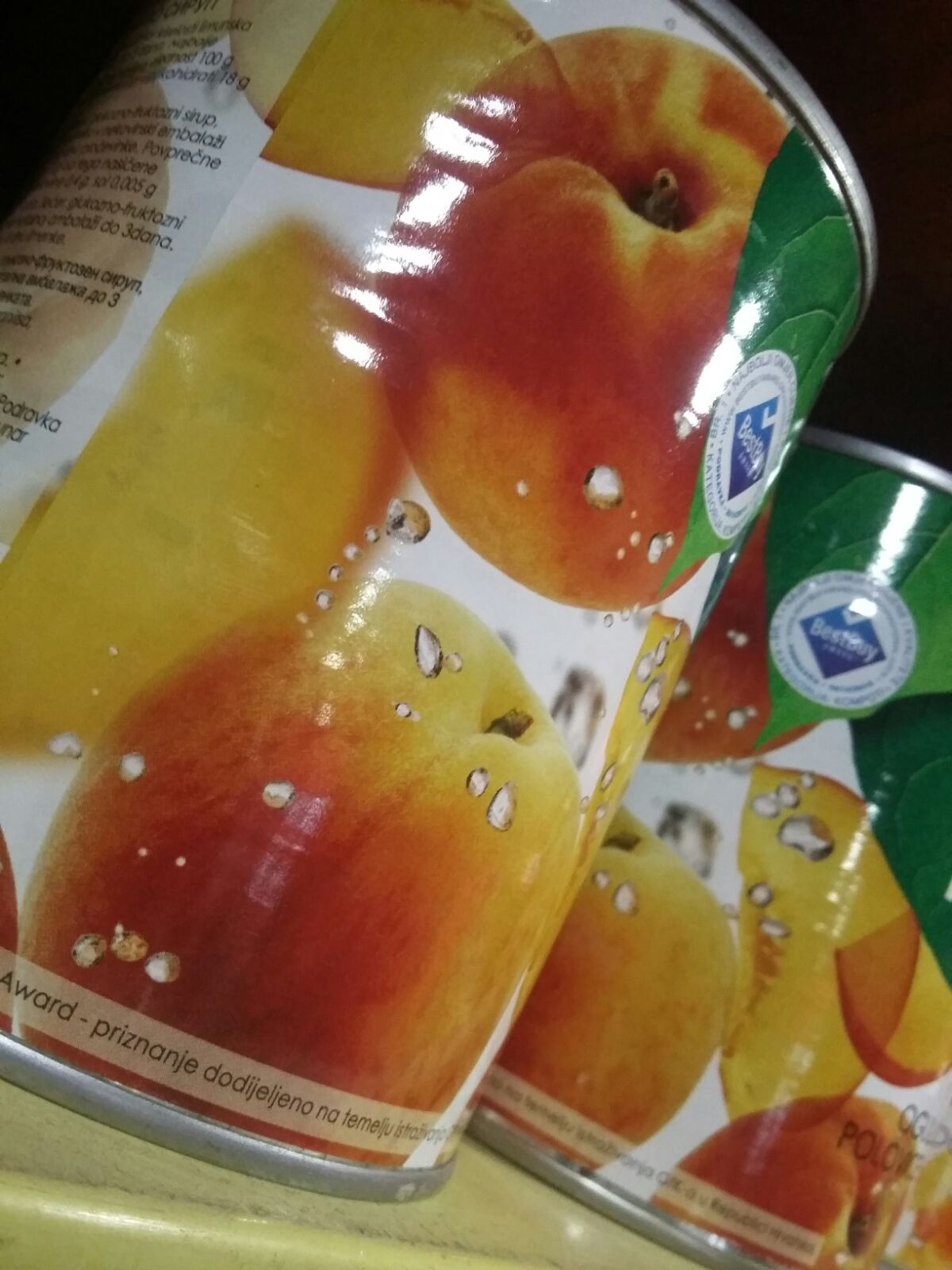 конзервисано воће